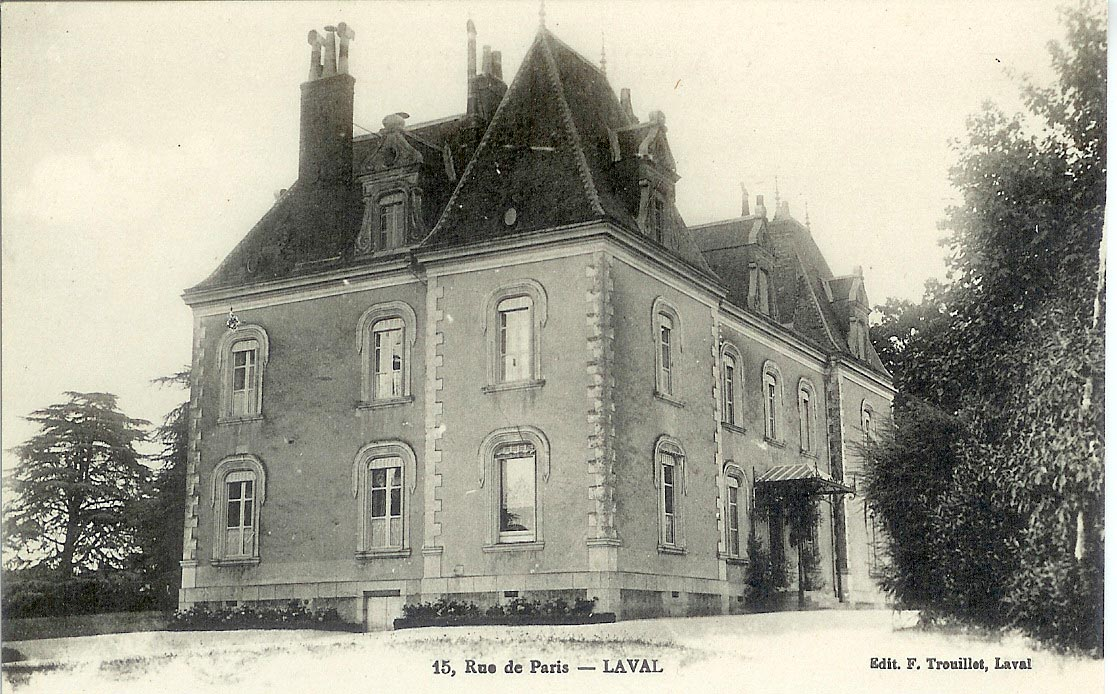 la propriété « Dulong de Rosnay »